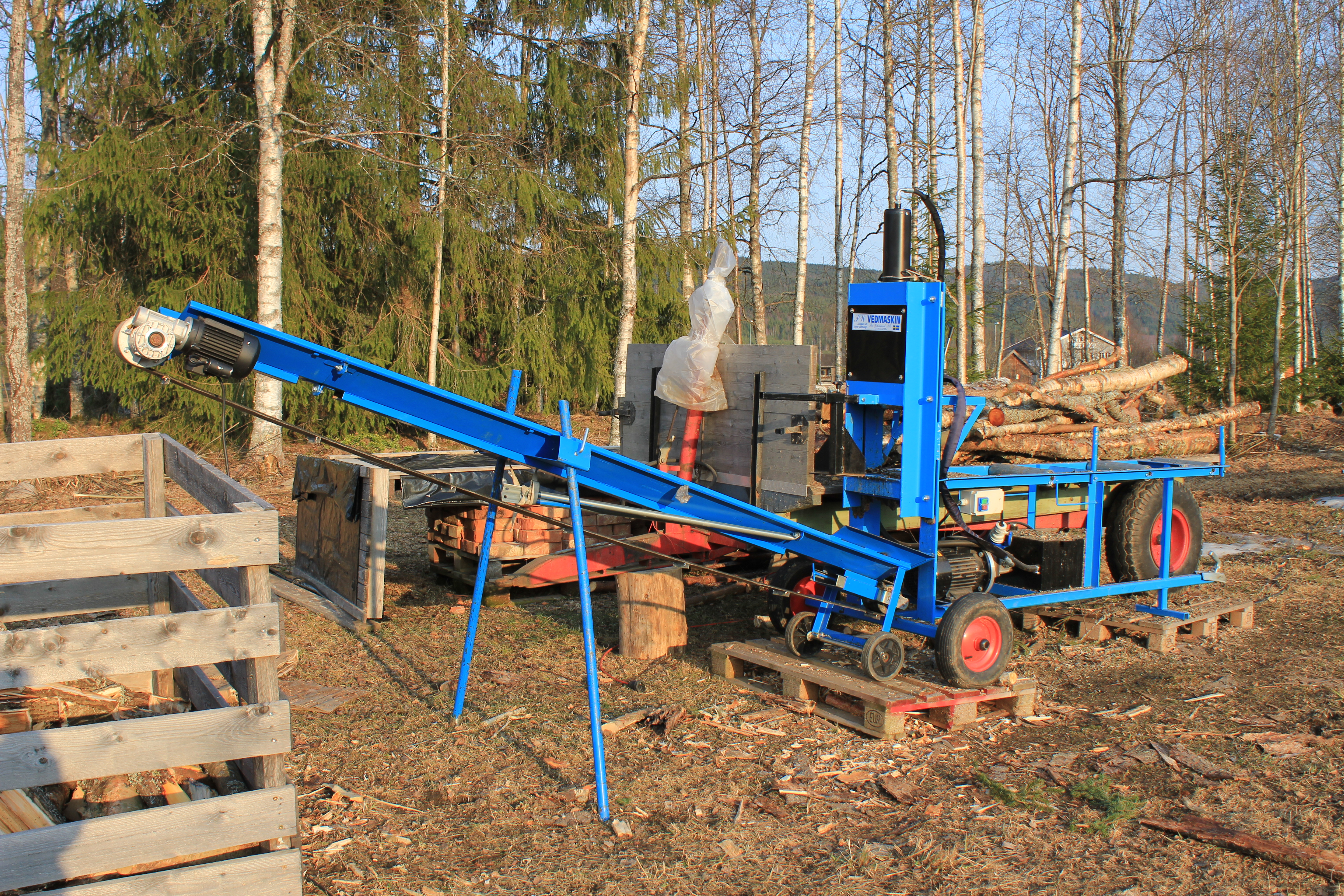 Vedkløyver.